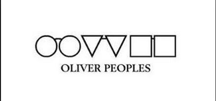 조선말: 올리버 피플스 로고